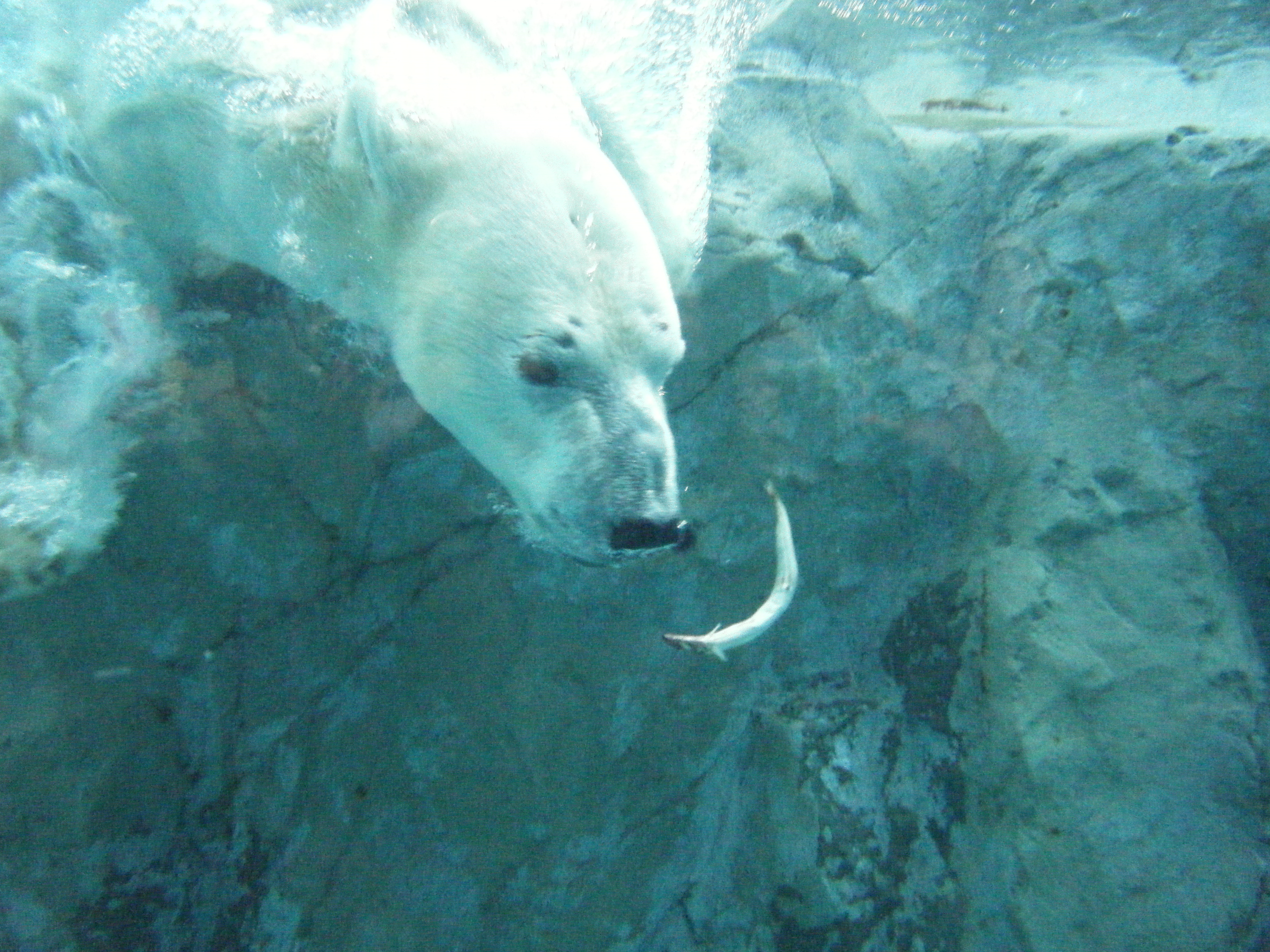 ホッキョクグマがえさを追っている場面（旭川市旭山動物園にて）。